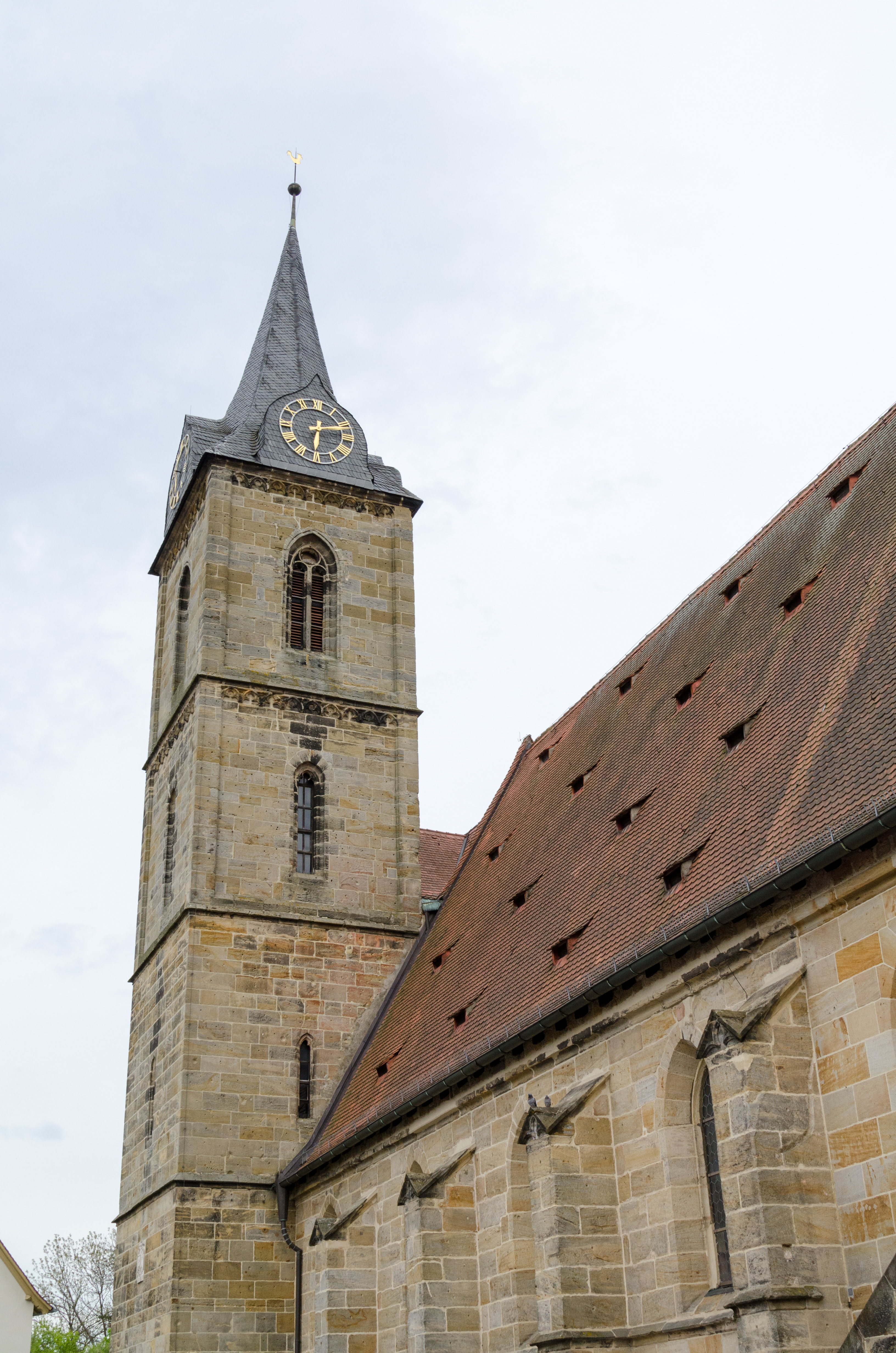 Hallstadt, St. Kilian